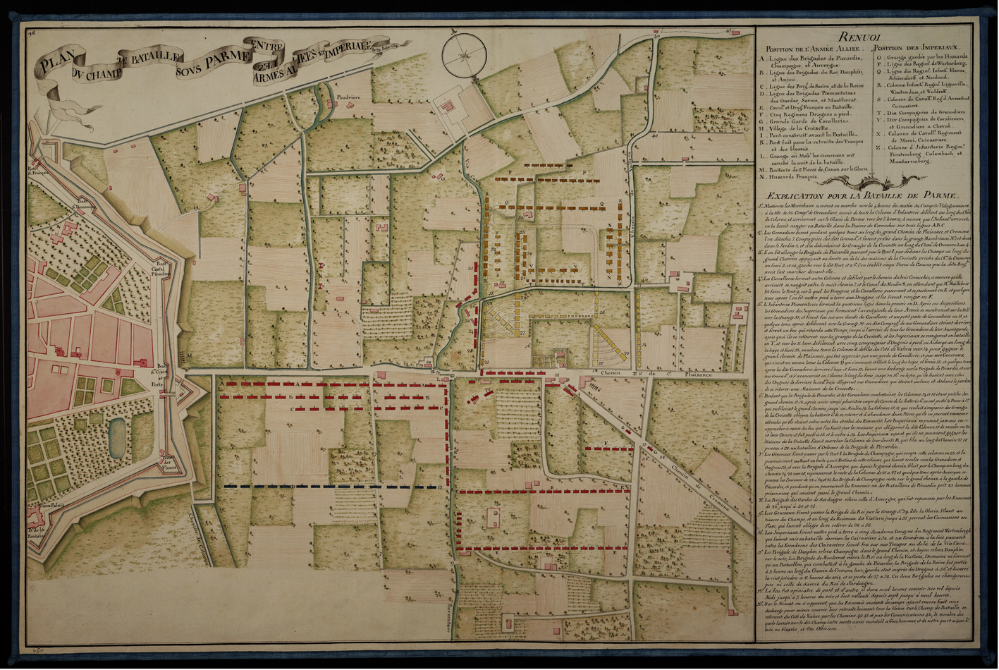 Plan et détails de la bataille de San Pietro (ou bataille de Parme) de juin 1734.